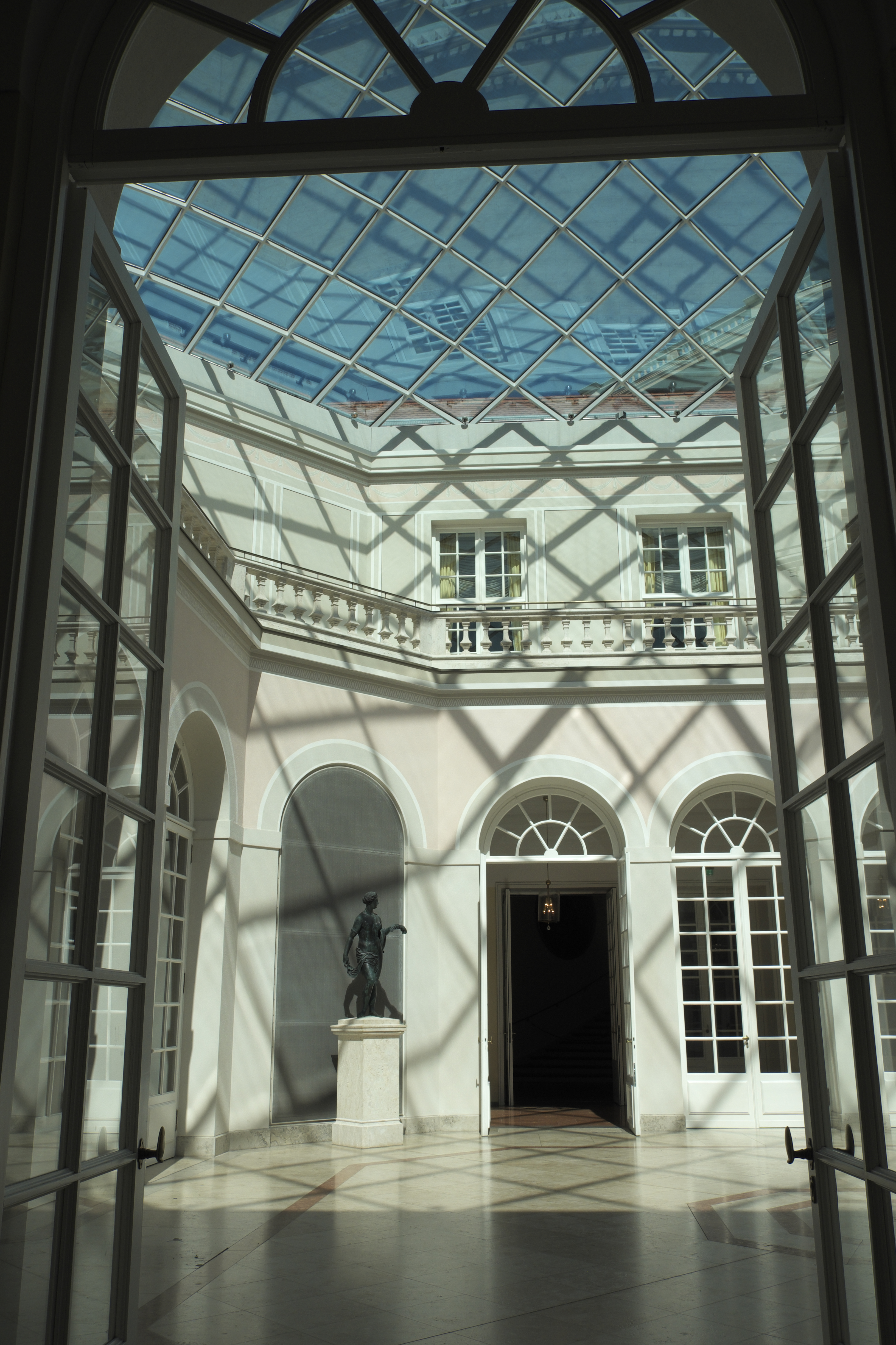 Cuvilliés-Theater in der Münchner Altstadt im Stadtbezirk Altstadt-Lehel (Bayern/Deutschland)